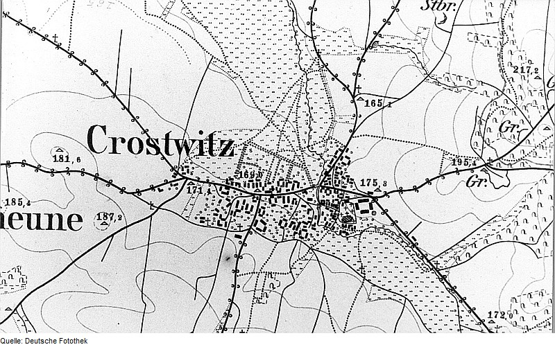 Original image description from the Deutsche FotothekCrostwitz. Meßtischblatt, Sekt. Kloster Marienstern, 1884